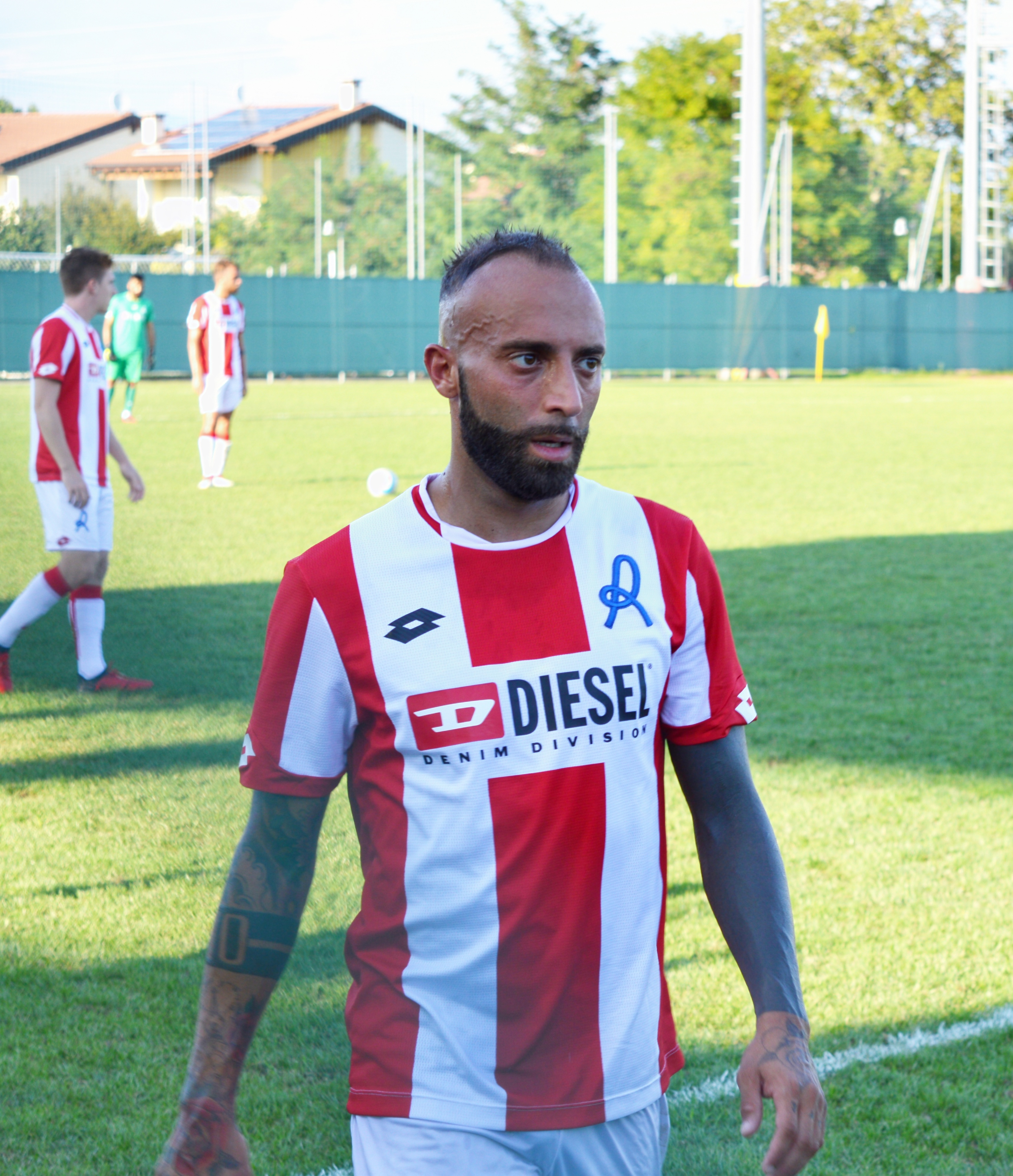 Giacomelli alla sostituzione in Vicenza-Cittadella, amichevole, stadio di Caldogno (VI)